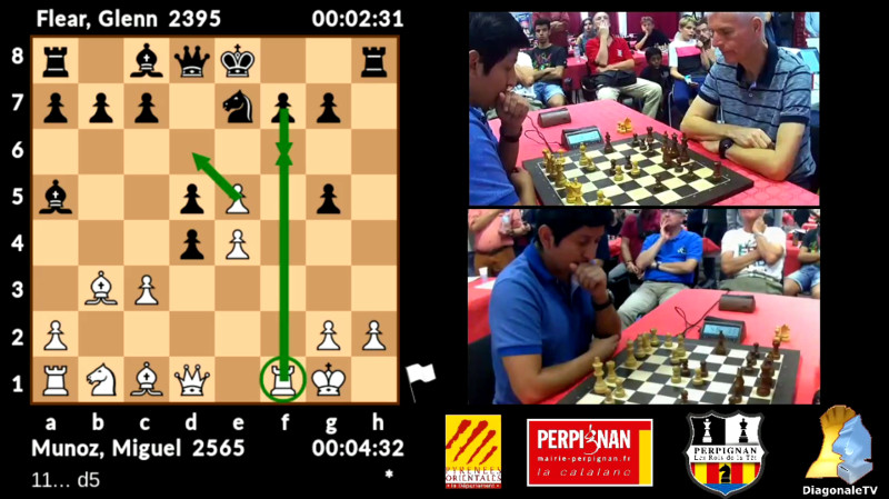 Le GMI Miguel Munoz en finale du Festival de Perpignan 2019 face au GMI Glenn Flear